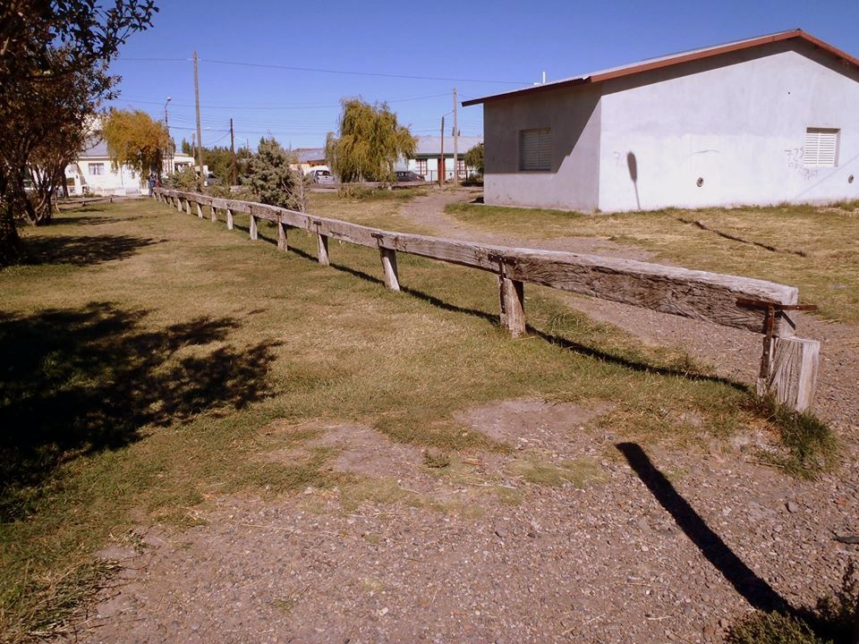 Plaza decorada con durmientes ferroviarios